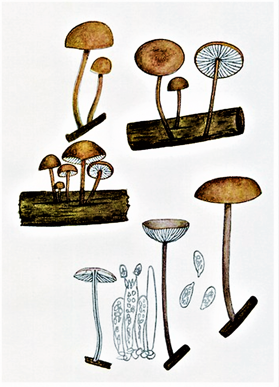 Giacomo Bresadola: Marasmius scorodonius (Fr., 1836, heute Mycetinis scorodonius (Fr.) A.W.Wilson & Desjardin (2005)